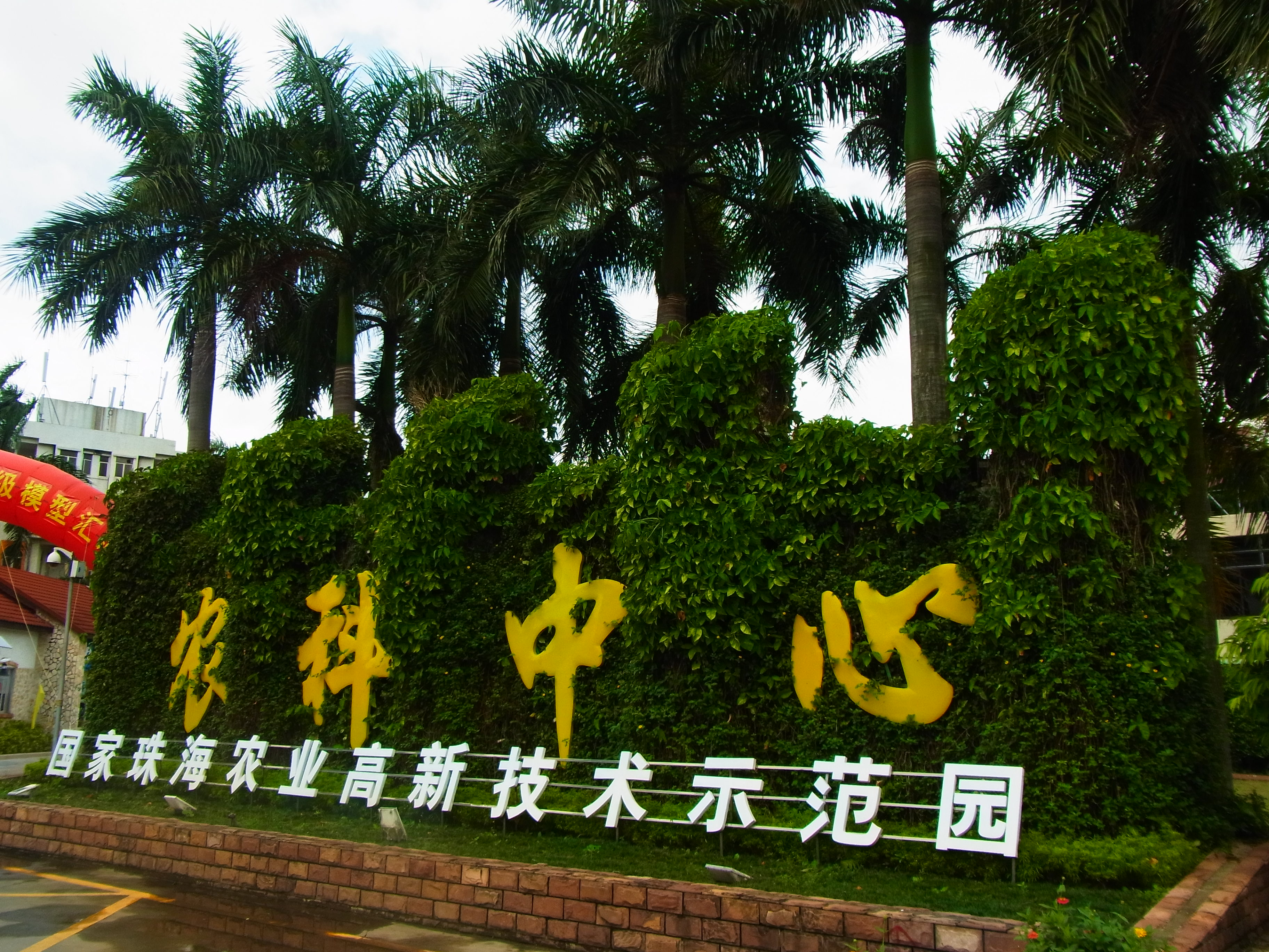 中文（香港）: 珠海农科中心